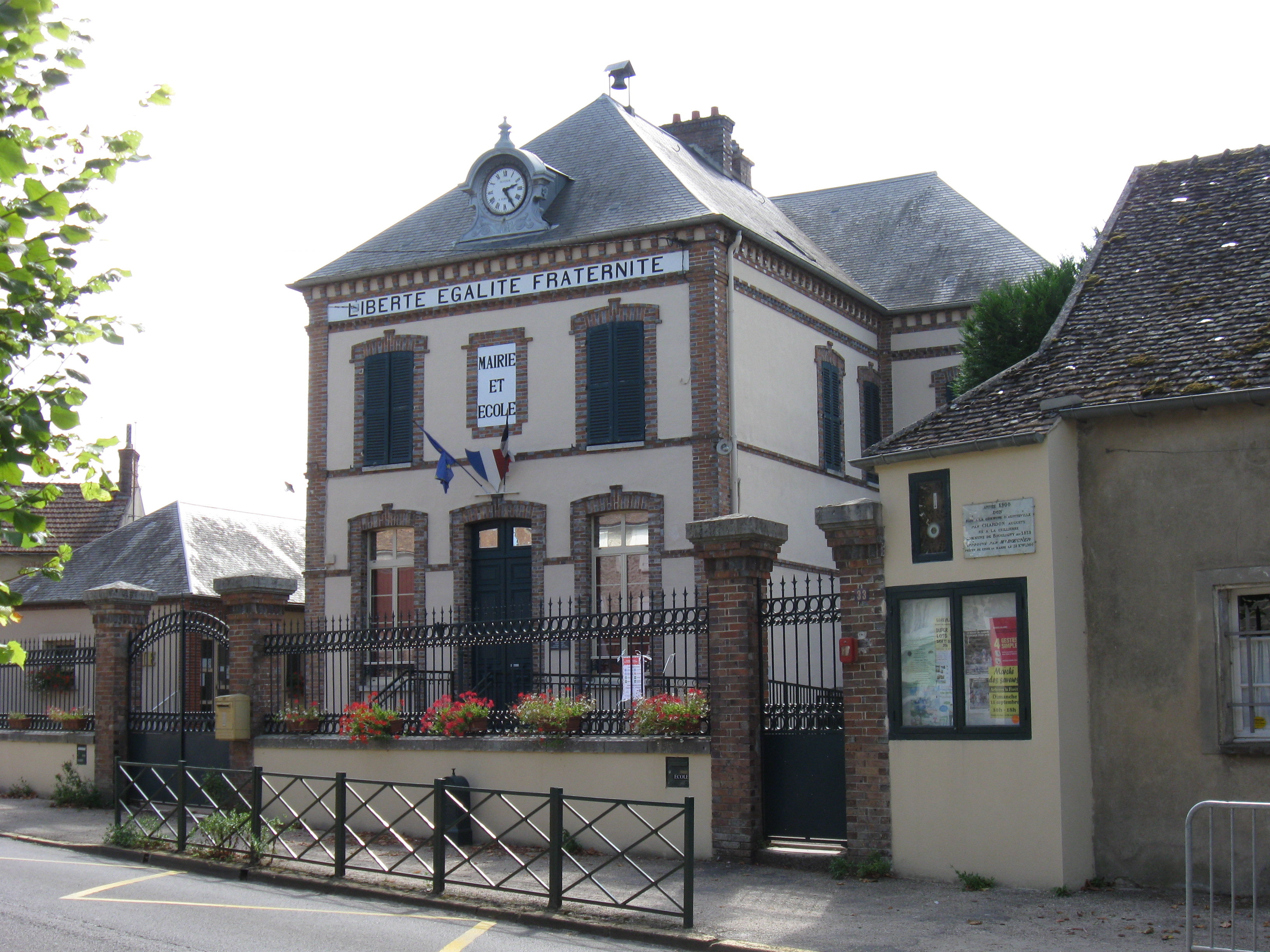 Mairie d'Aufferville. (Seine-et-Marne, région Île-de-France).